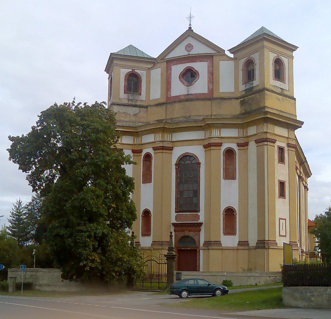 kostel Nalezení sv. Kříže v Dubé